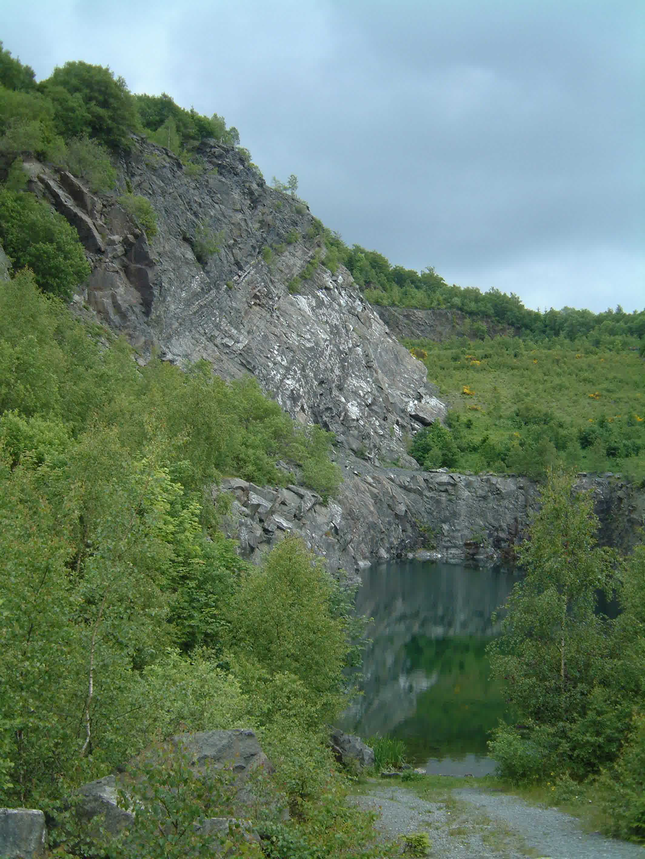 Felsbereich gehört noch zu NSG, Steinbruchsee liegt im LSG Winterberg.